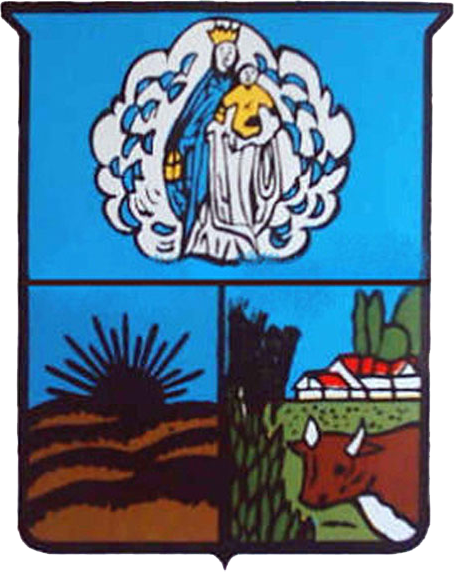 Escudo de Pellegrini